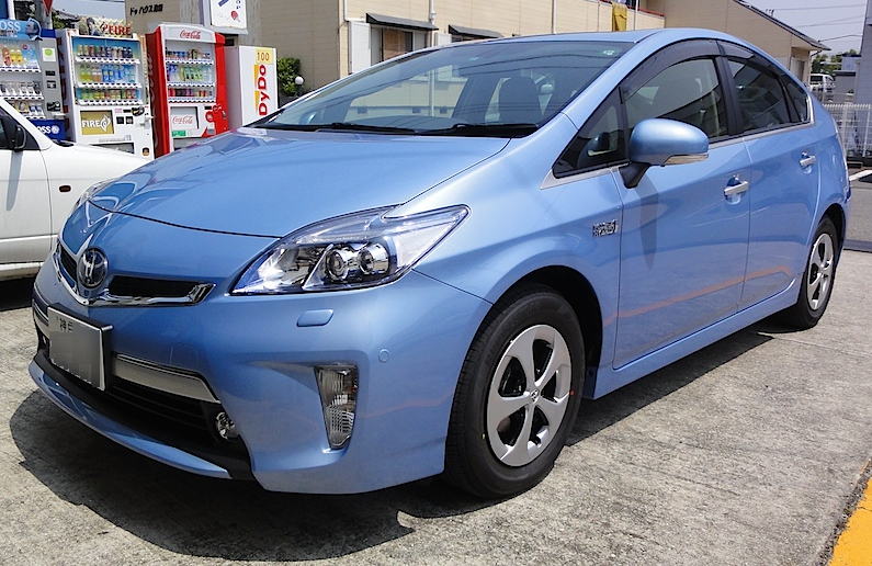 プリウスPHV（ZVW35、市販車）